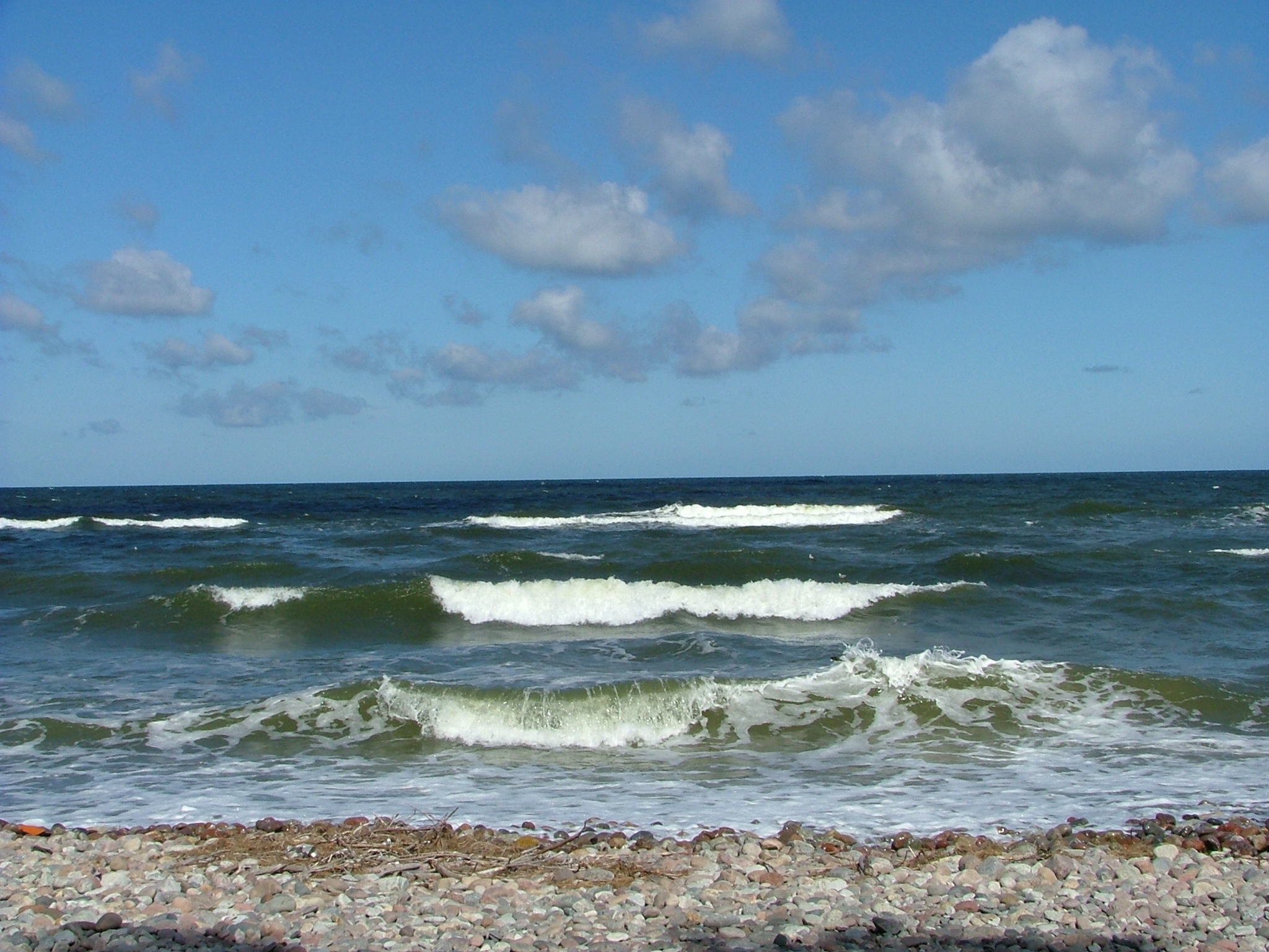 Jarosławiec (województwo zachodniopomorskie)